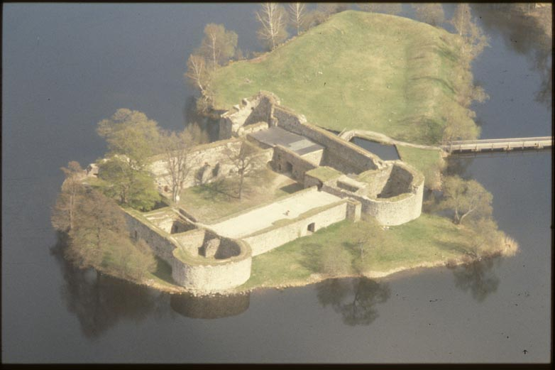 Växjö 93:1. Befäst anläggning, borgområde, bestående av slottsruin uppförd i gråsten samt 2 förborgar. Motiv: Växjö 93:1 Kategori: Slott/herresäte Växjö 93:1. Befäst anläggning, borgområde, bestående av slottsruin uppförd i gråsten samt 2 förborgar. Växjö 93:1.